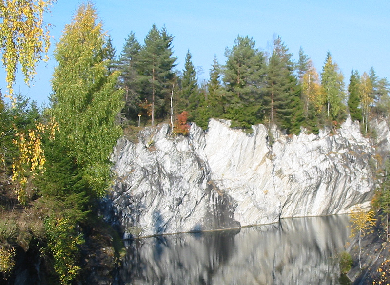 Marmor Ruskeala kaevanduses Karjalas.